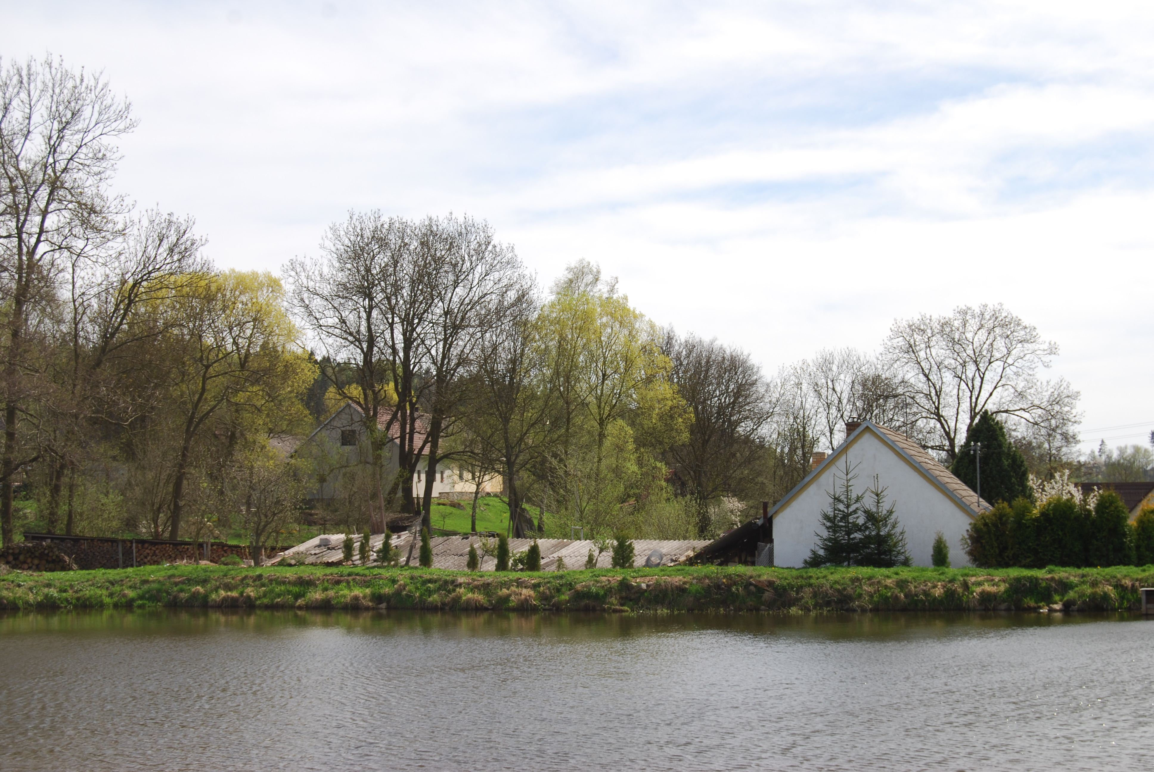 Pohled na obec. Starcova Lhota je malá vesnice, část obce Nadějkov v okrese Tábor. Česká republika.